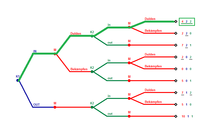 3- Spieler Kaufhauskettenspiel, Gleichgewichtspfad grün